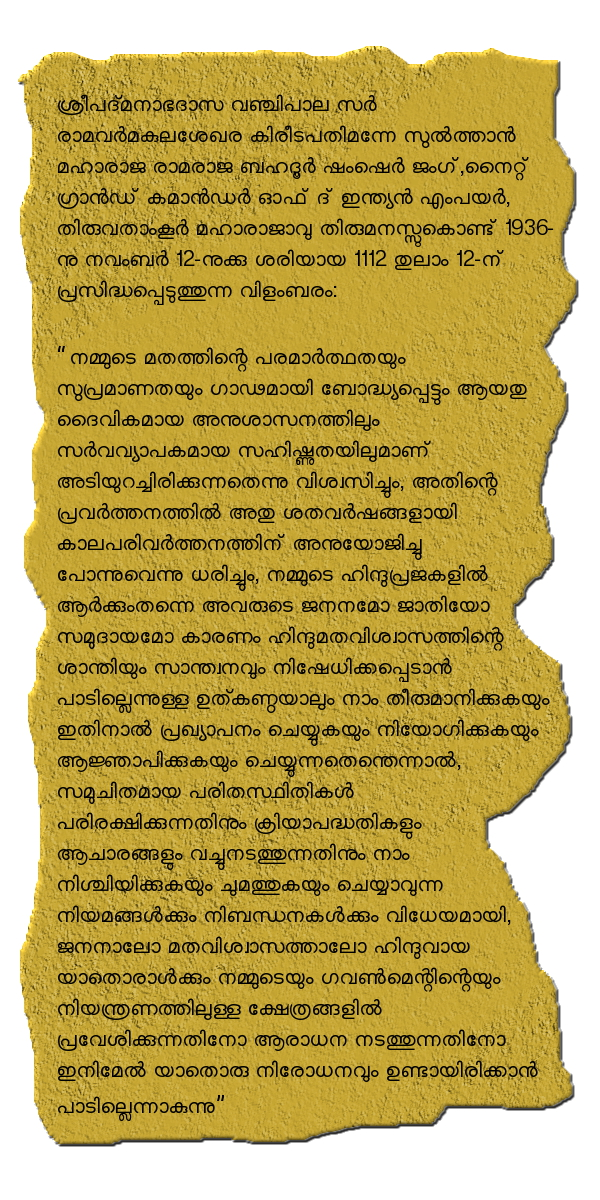 ക്ഷേത്രപ്രവേശന വിളംബരം